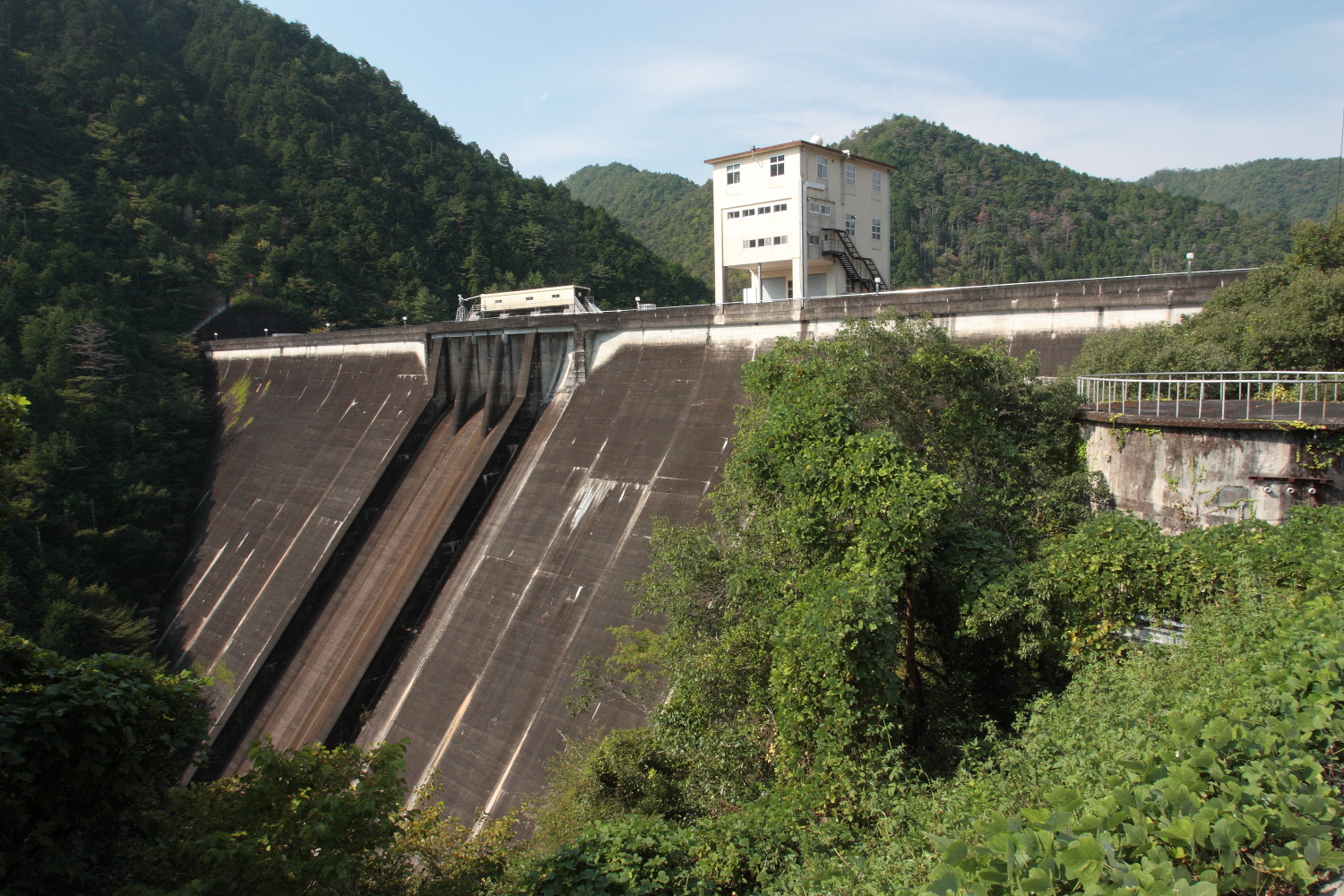 宇連ダム（新城市、2009年）